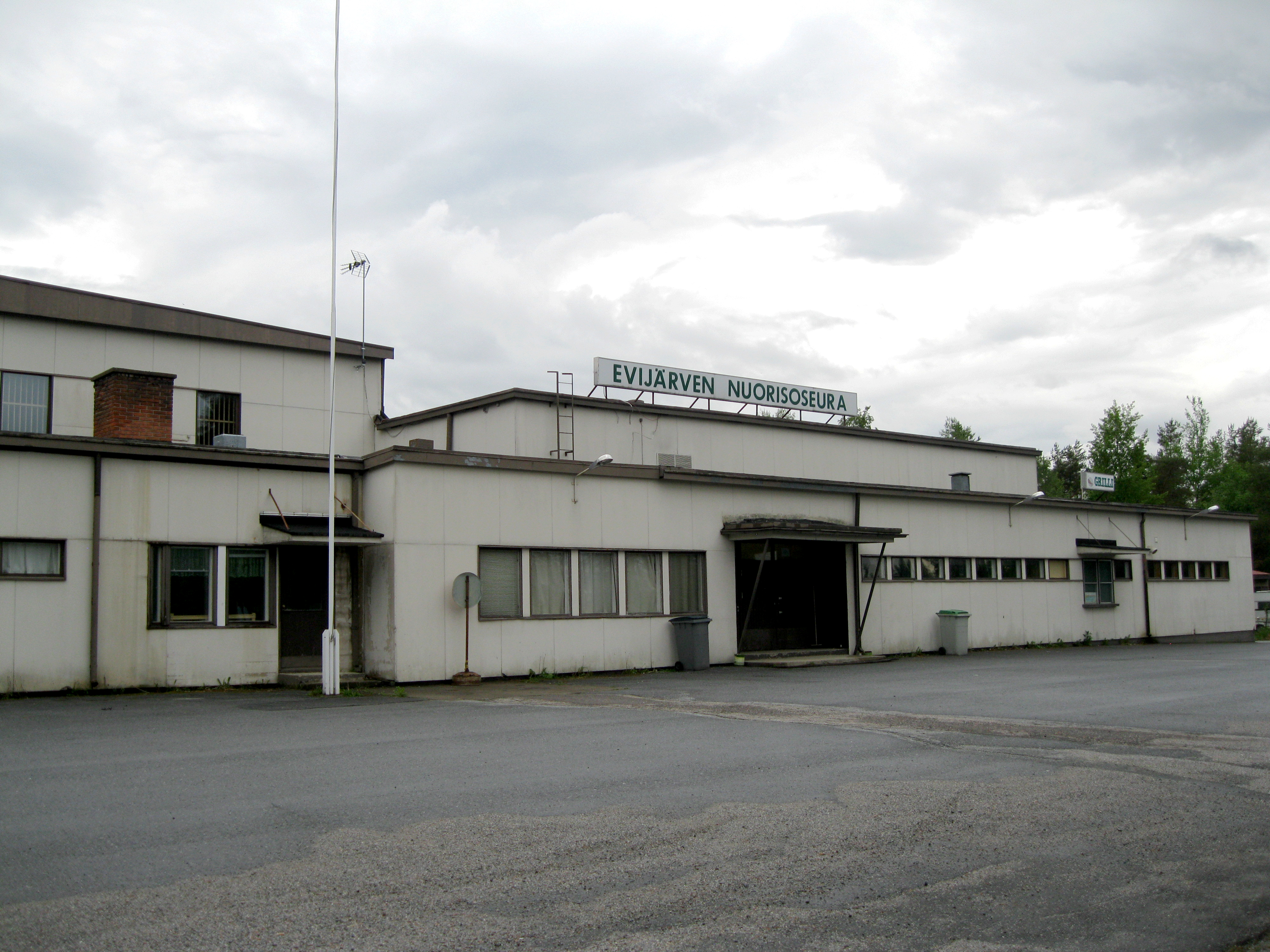 Evijärven Nuorisoseura kesäkuussa 2015.